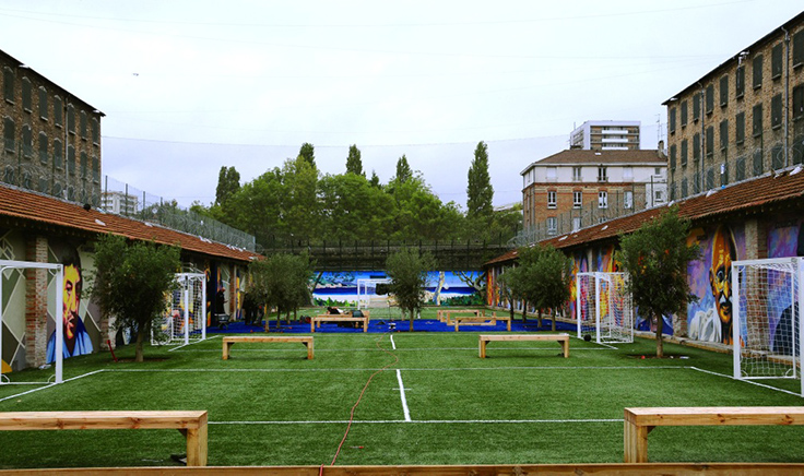 Plateausportif